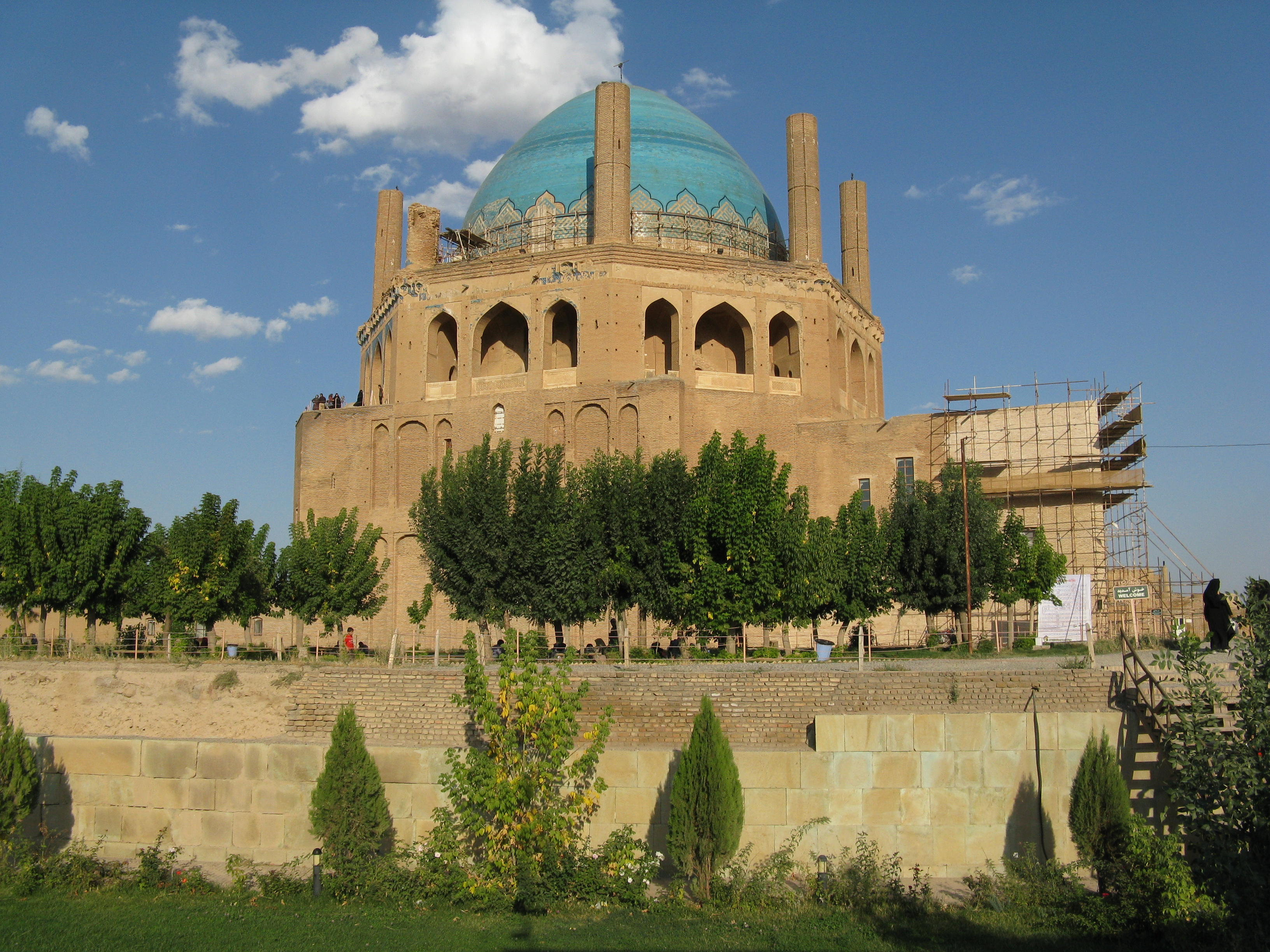 Soltaniyeh dome, Zanjan